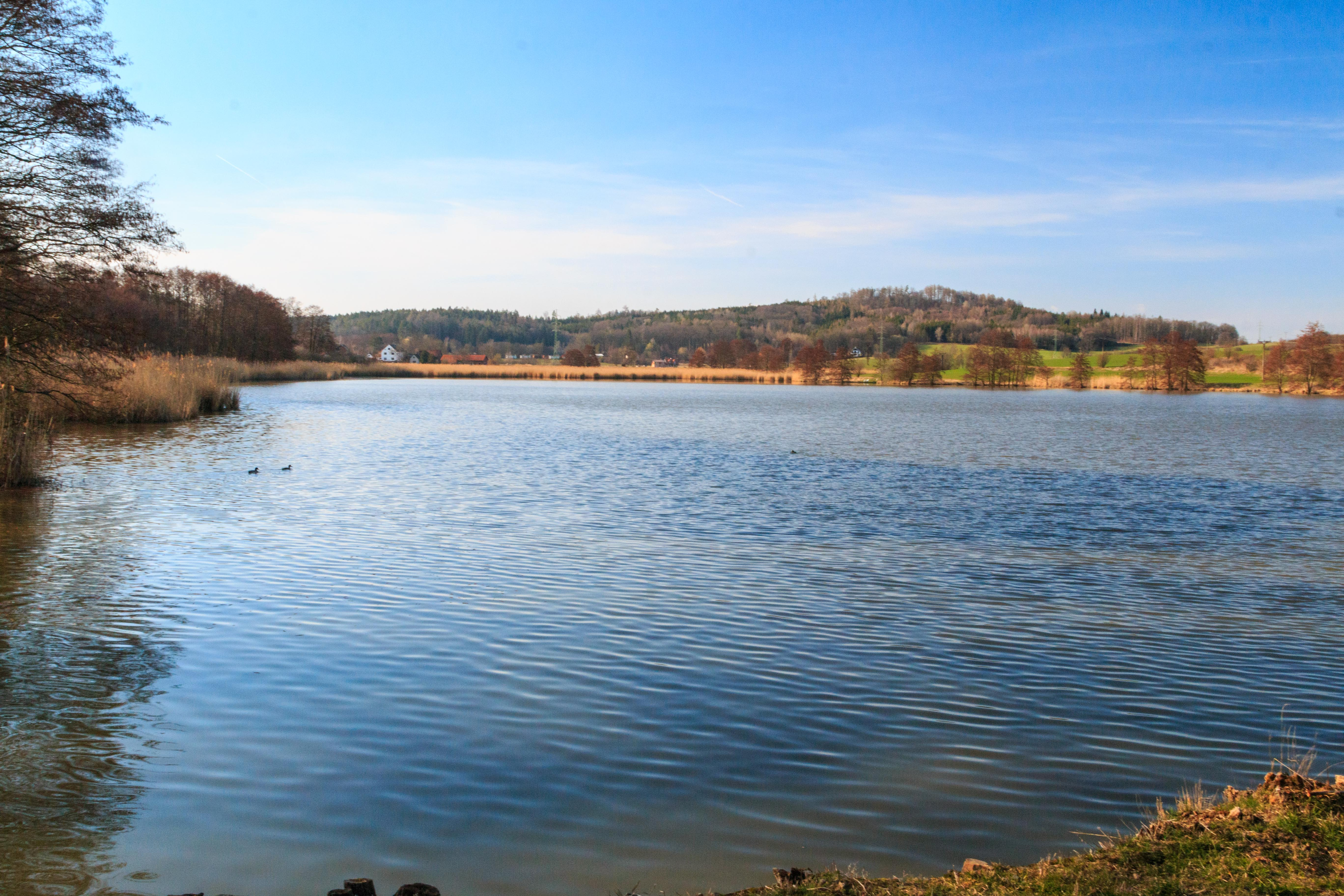 Lhotský rybník u Ostružna